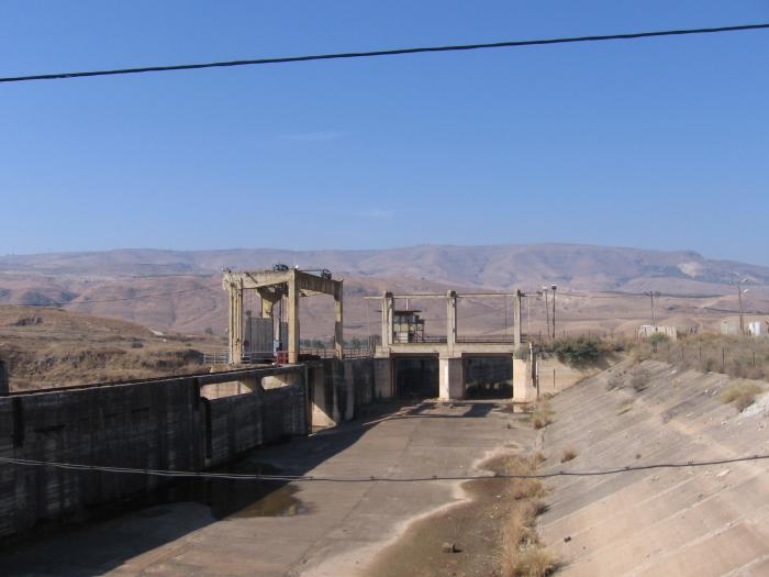 מפעל החשמל של פנחס רוטנברג המכונה "הזקן מנהריים".